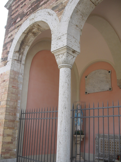 Chiesa di San Costanzo a Perugia - Portico